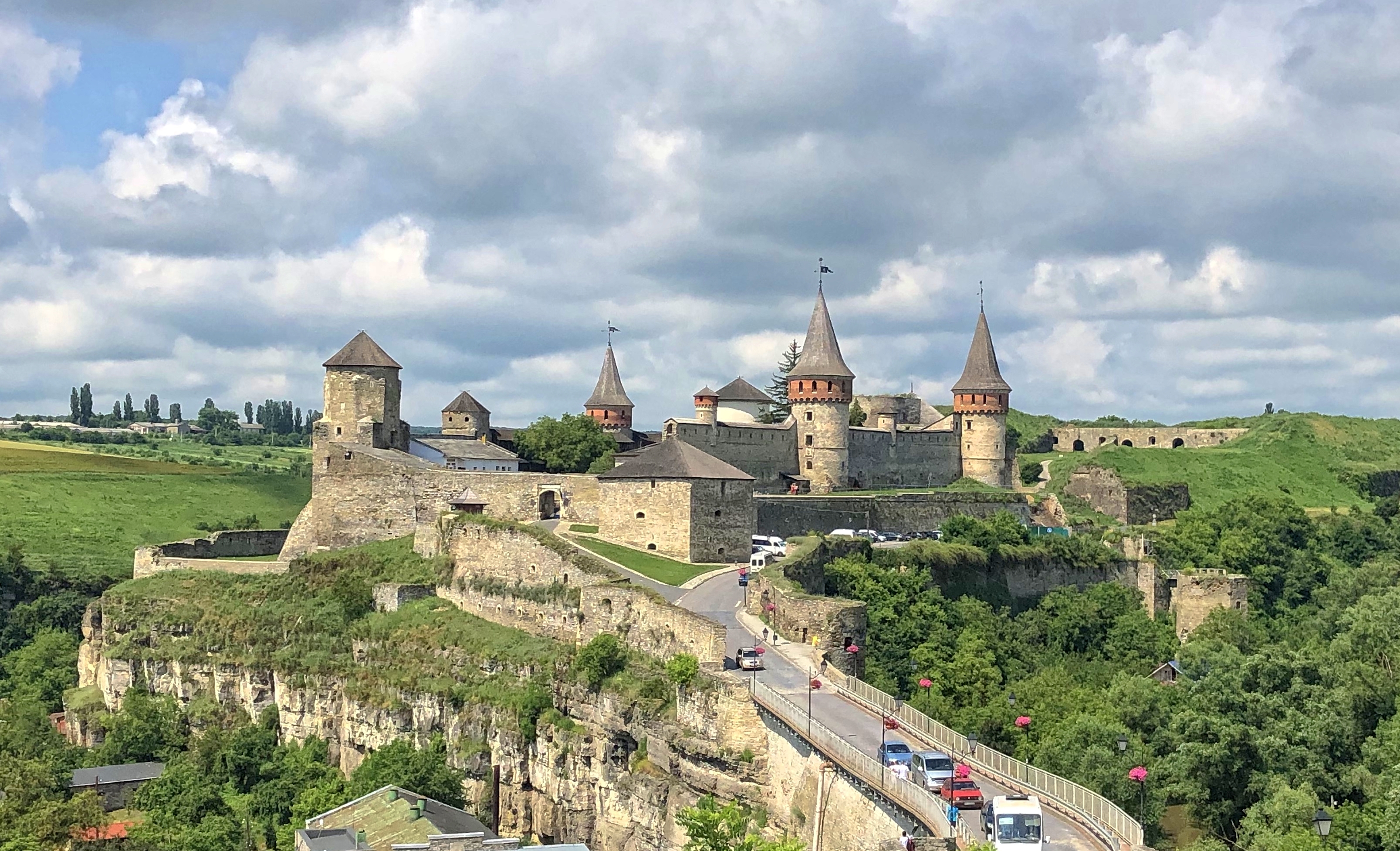 Zamek (twierdza) w Kamieńcu Podolskim w czerwcu 2019 r.